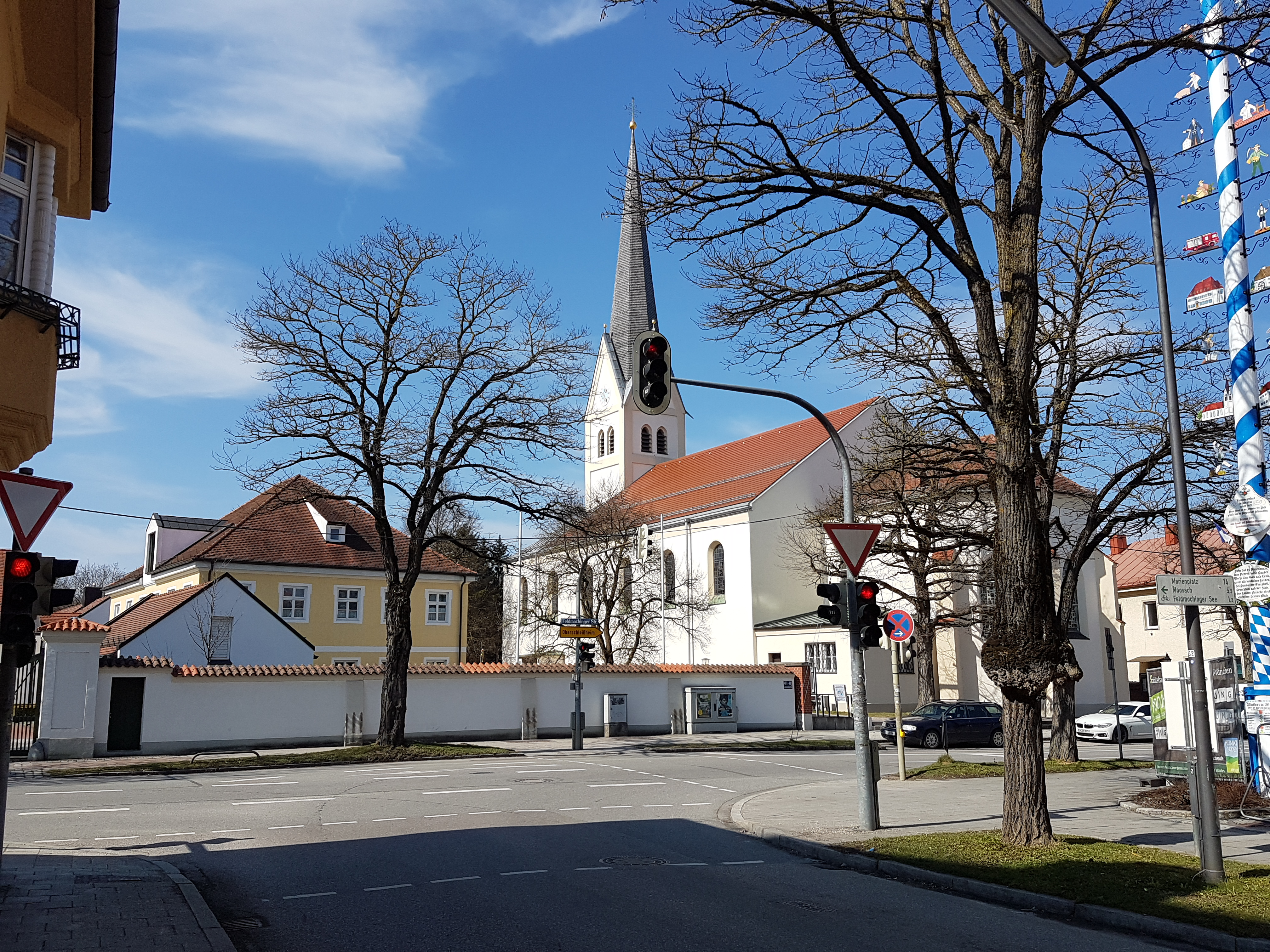 Feldmoching (München), südlicher Teil des Dorfangers mit Pfarramt und - kirche